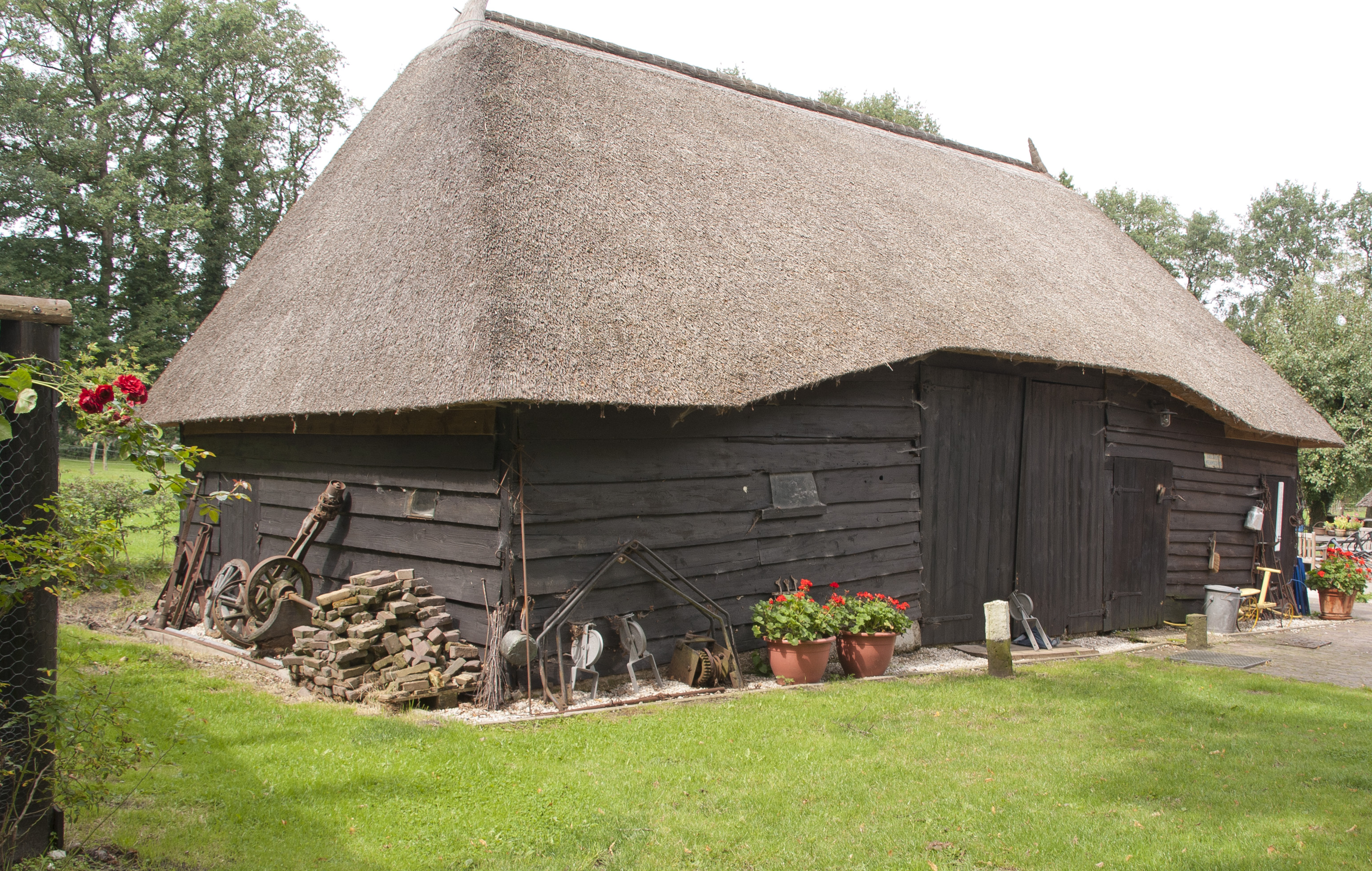 vroeg 20e eeuwse houten veeschuur